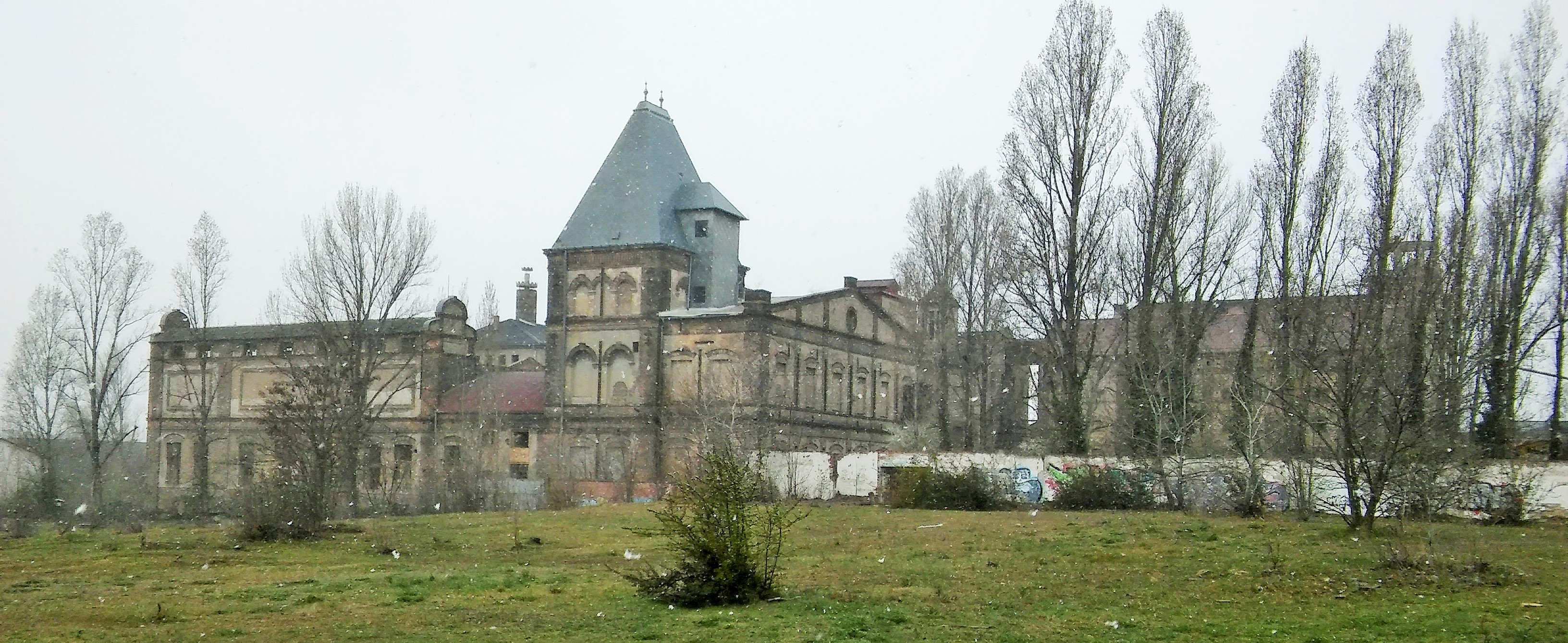 Dreher Sörgyárak épület az Ihász utca felől